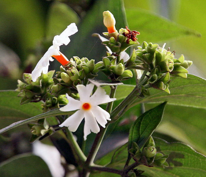 Harshingar or Parijat Nyctanthes arbor-tristis in Kolkata, West Bengal,Gang Siuli in Odisha, India, Siuli in Assam, India.